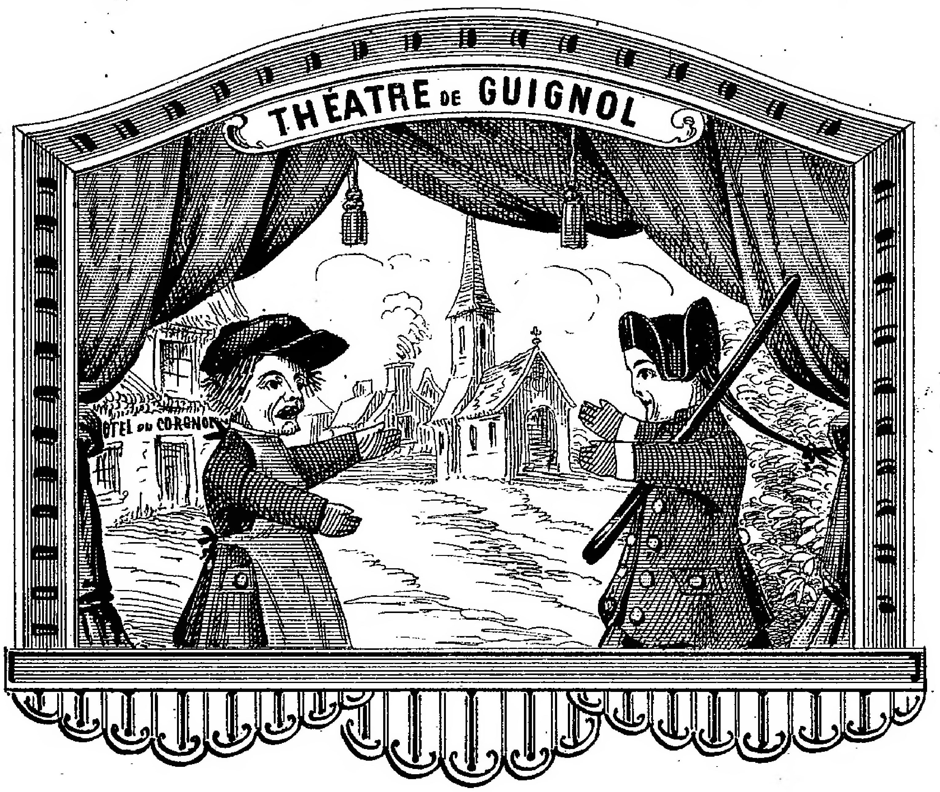 Image de la première page de "Le Déménagement de Guignol"